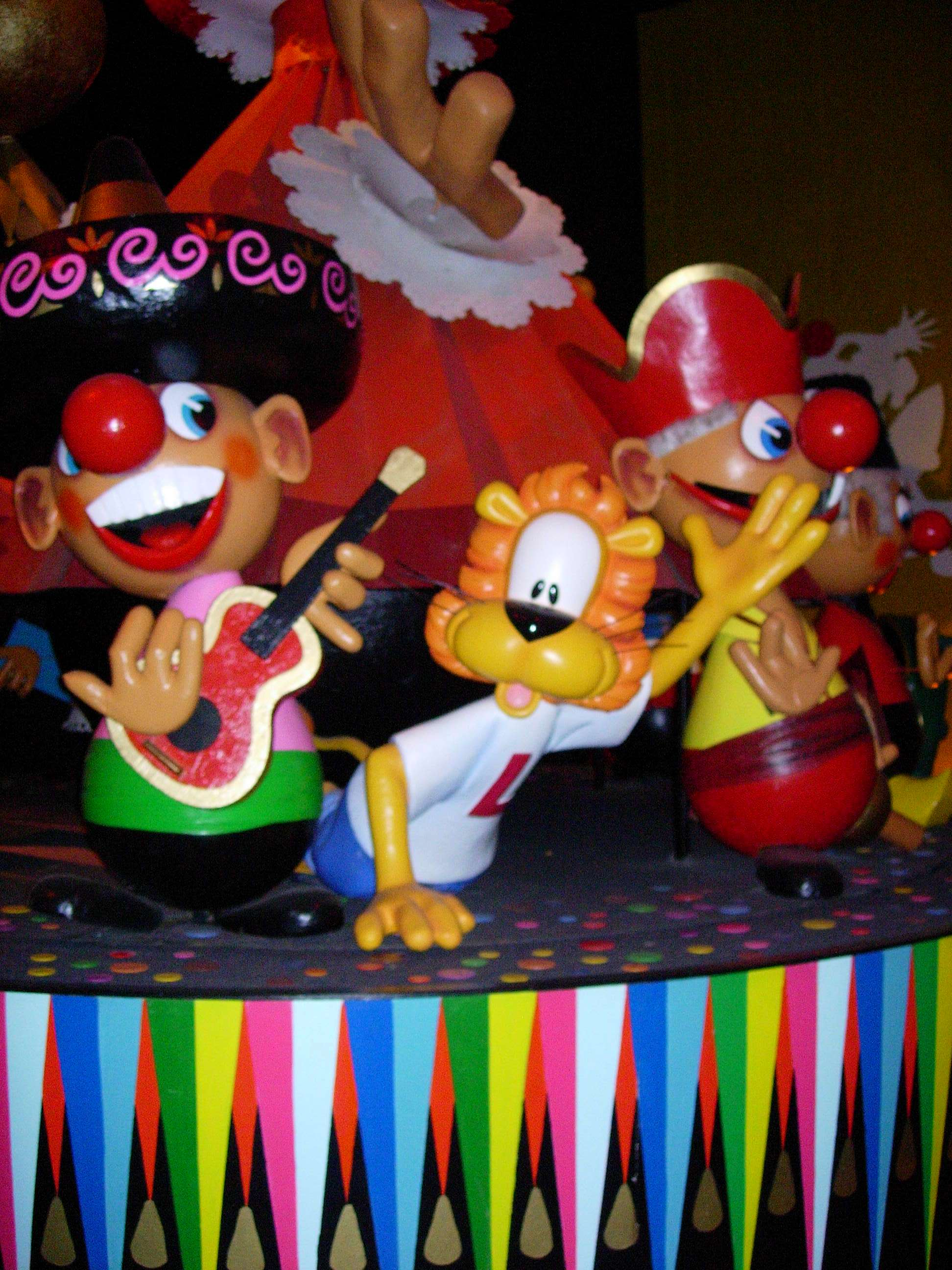 Loeki scène finale Carnaval Festival